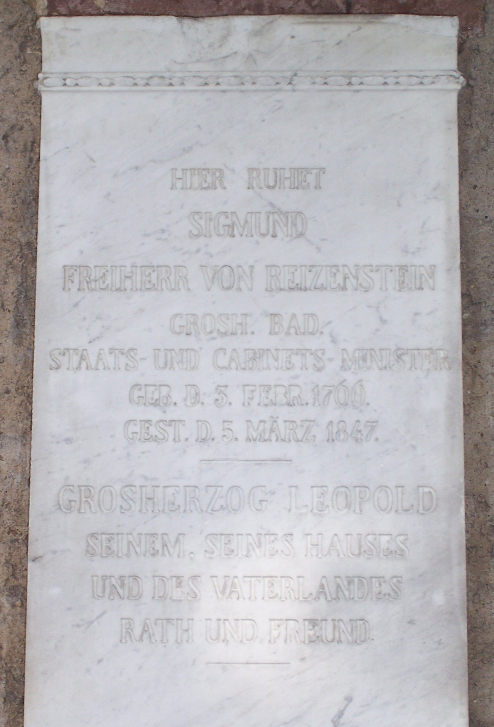 Grabplatte von Sigismund von Reitzenstein, Gruftenhalle, alter Friedhof, Karlsruhe